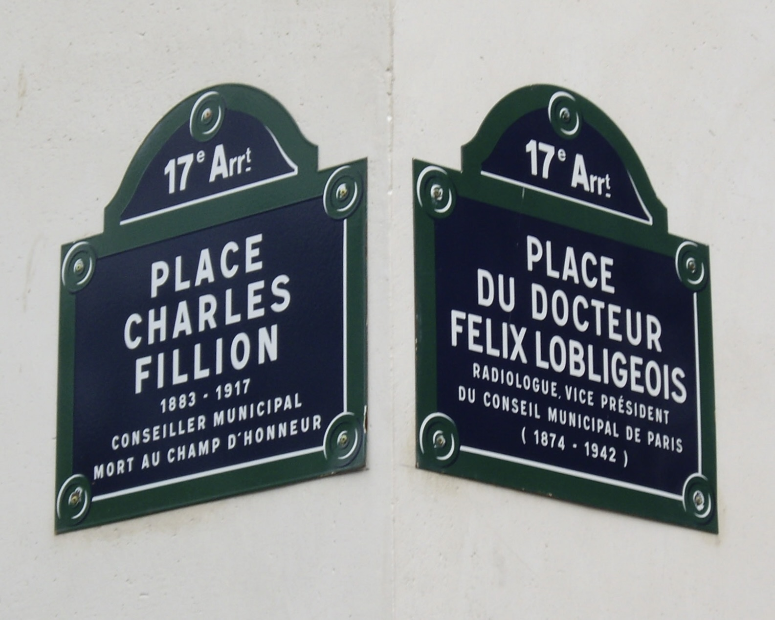 Paris 17e : place du Docteur-Félix-Lobligeois, place Charles-Fillion.